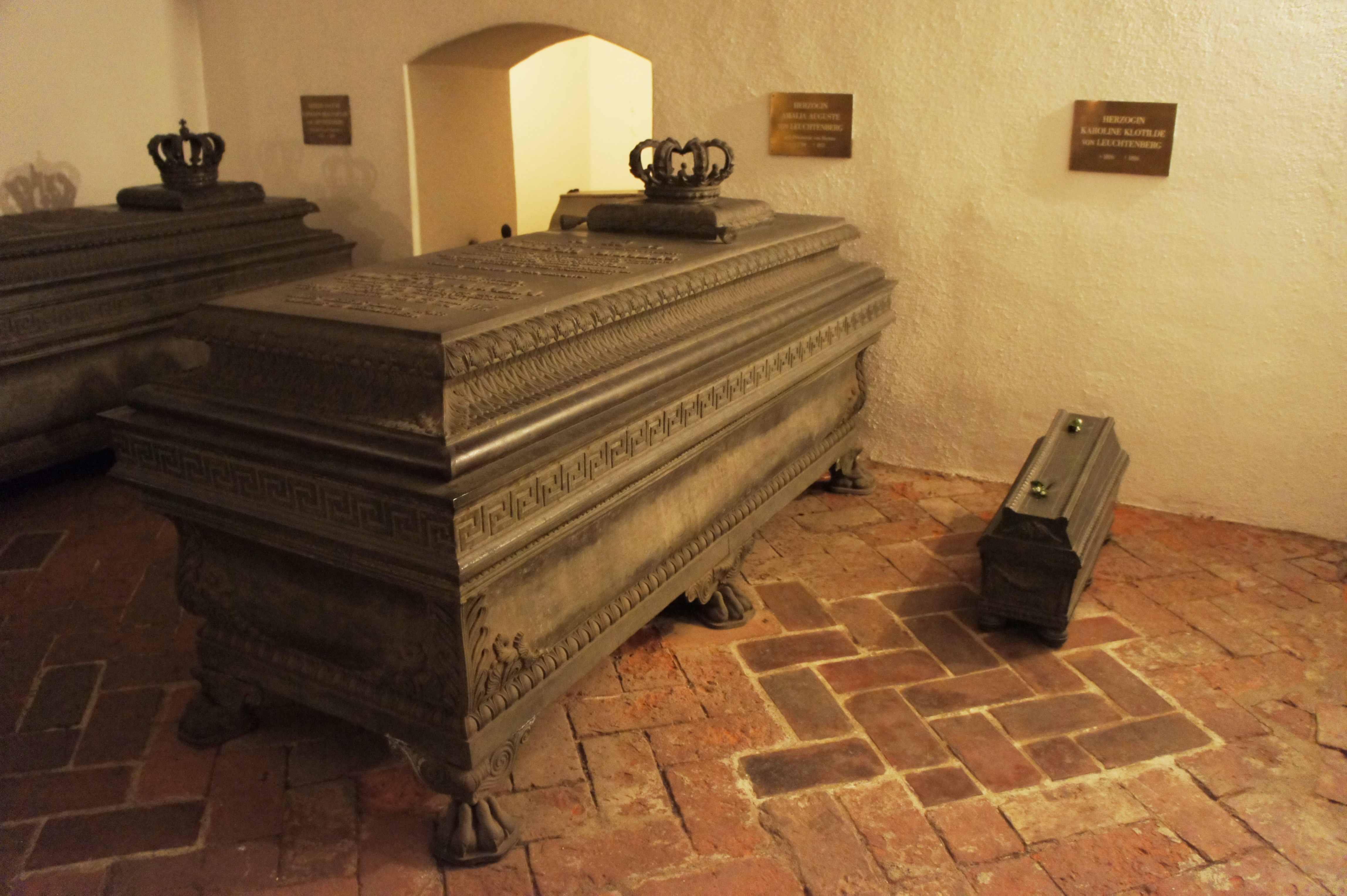 Sarkophage in der Grablege der Wittelsbacher in der St. Michael Kirche in München. Links Prinzessin Auguste (21. Juni 1788 – 13. Mai 1851) (Tochter von König Max I. Joseph), rechts Prinzessin Carolina Clotilde (16. Januar 1816 – 25. Juni 1816).